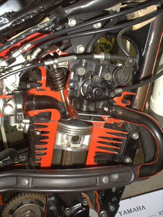 Aufgeschnittener 4-Taktmotor, Motorradmuseum Ibbenbüren, eigenes Bild, GFDL